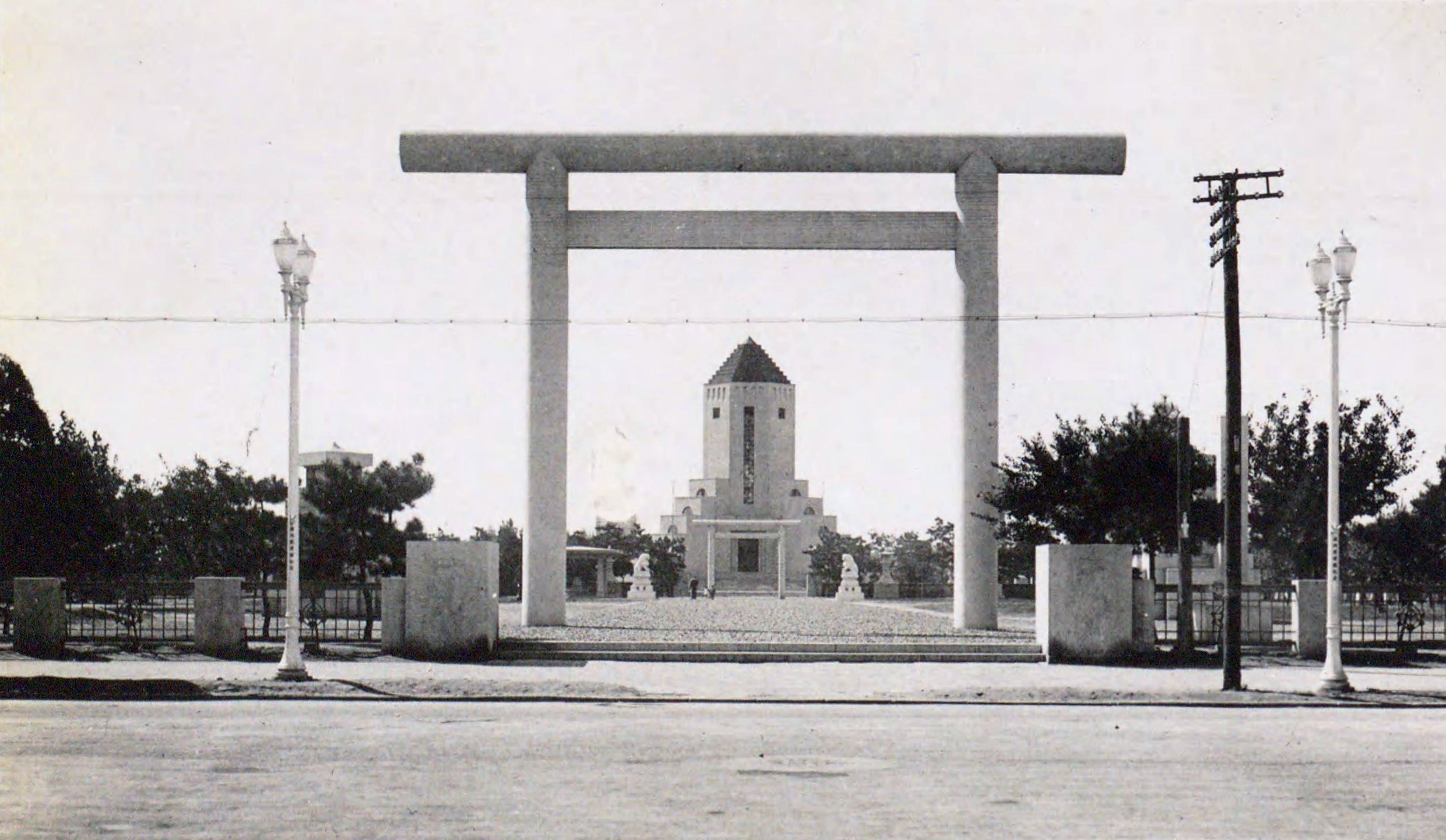 奉天忠霊塔(正面、鳥居の外から)